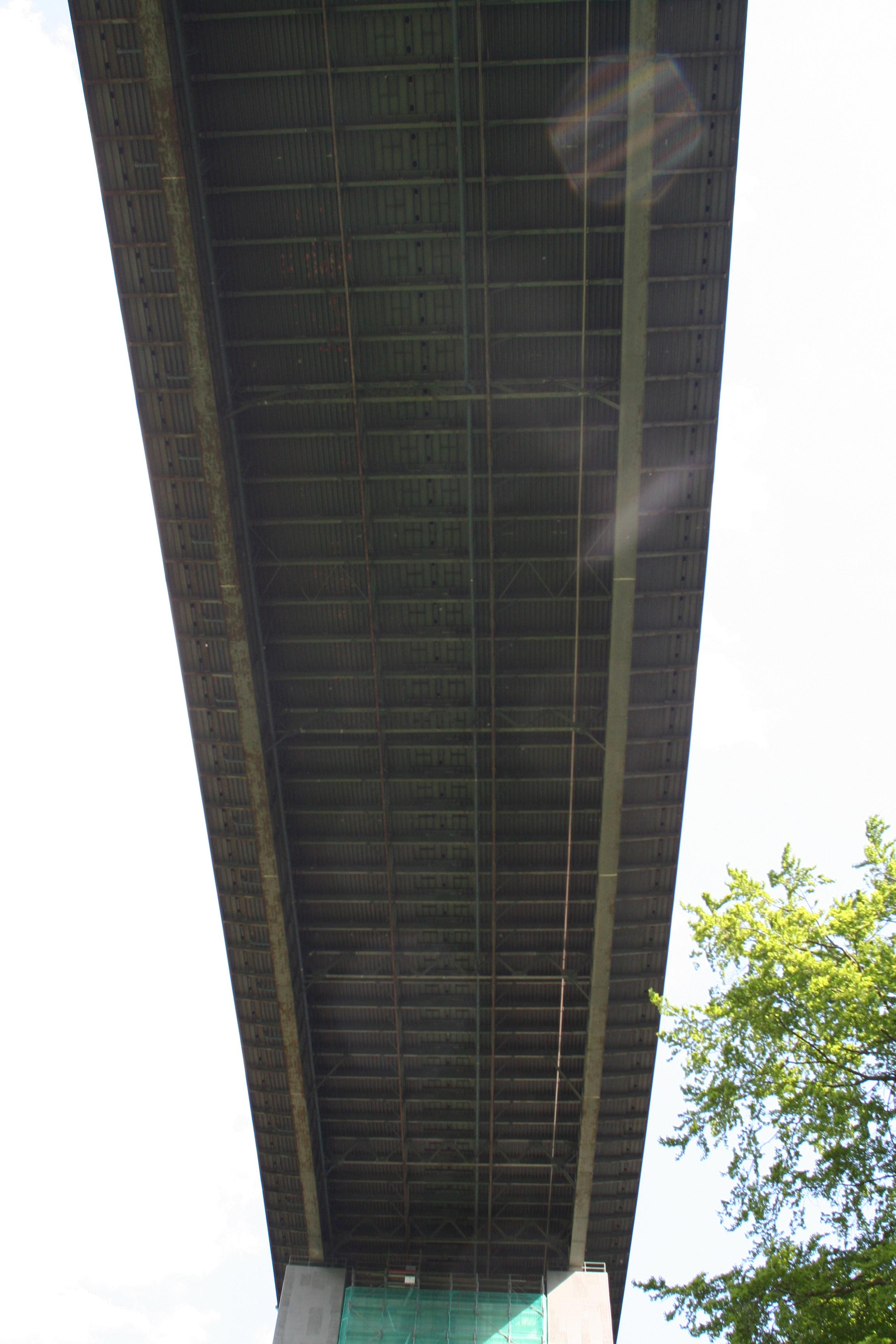 Untersicht der Grenzwaldbrücke der A7 bei Bad Brückenau in Unterfranken